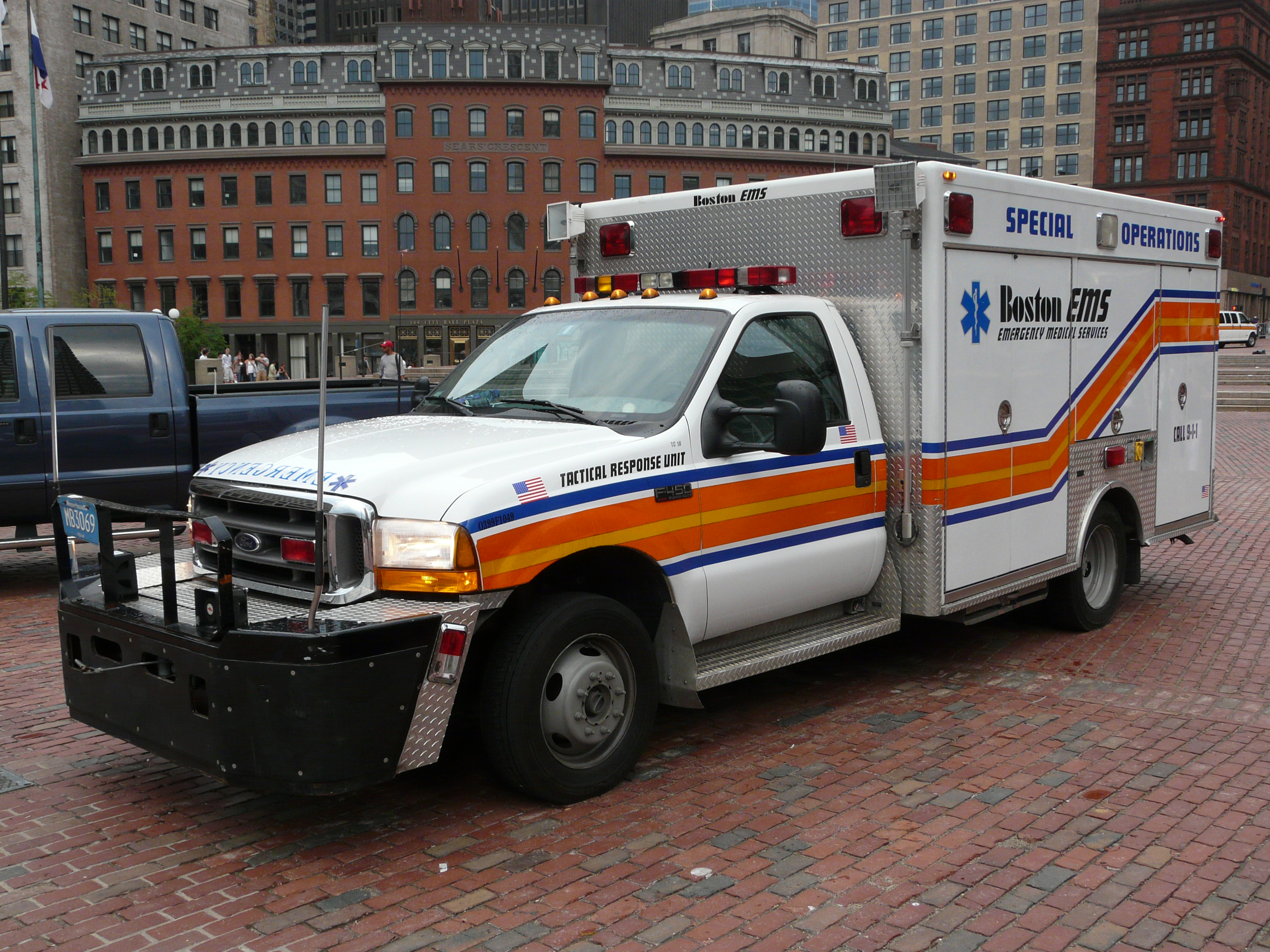 Boston